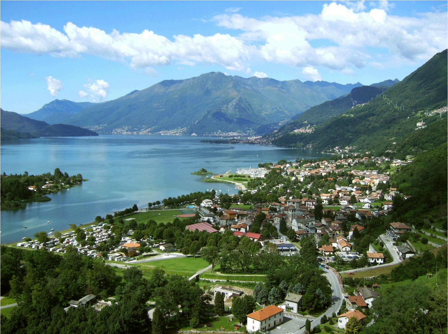 Sorico centro e la Foce del Fiume Mera